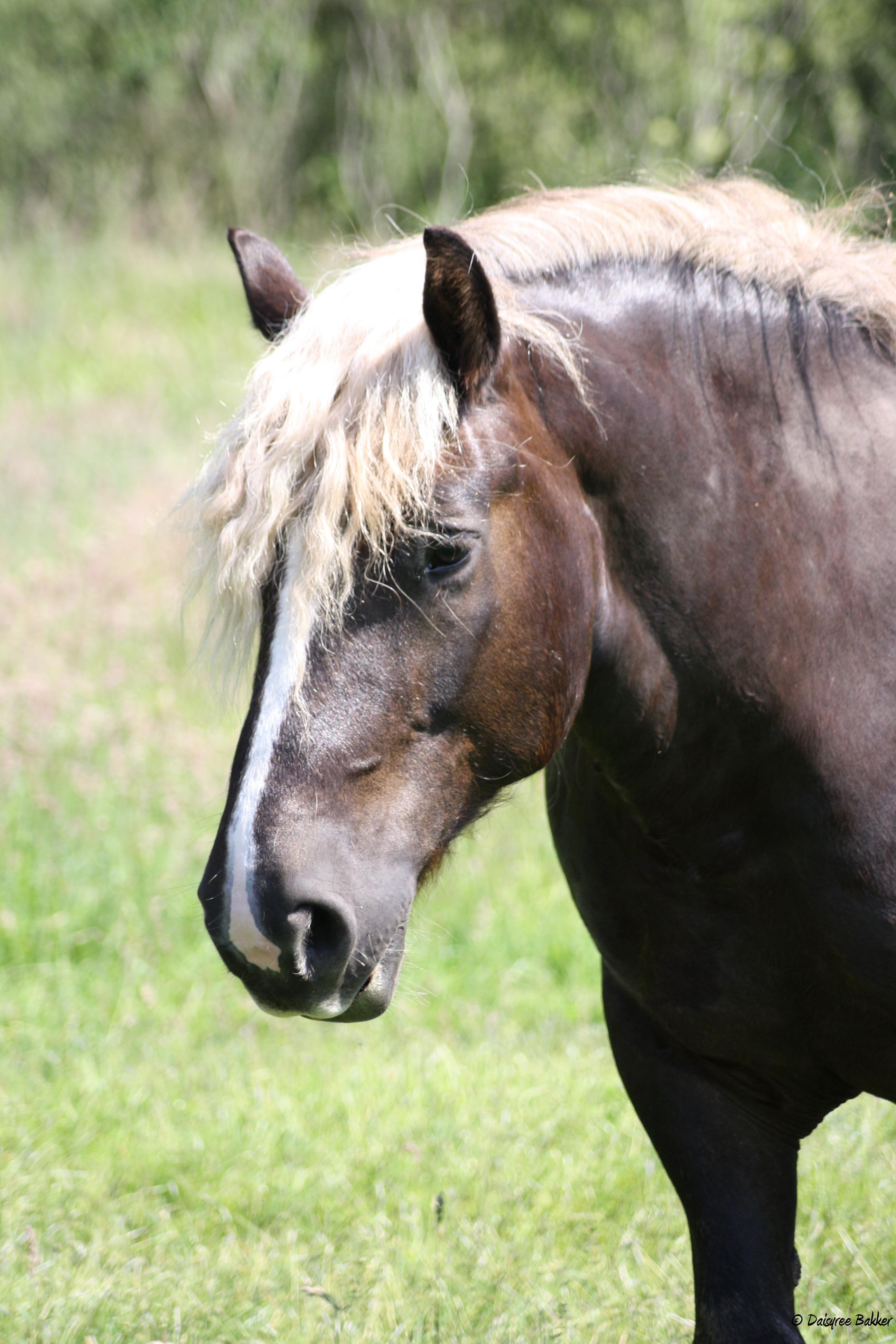 Schwarzwälder Fuchs